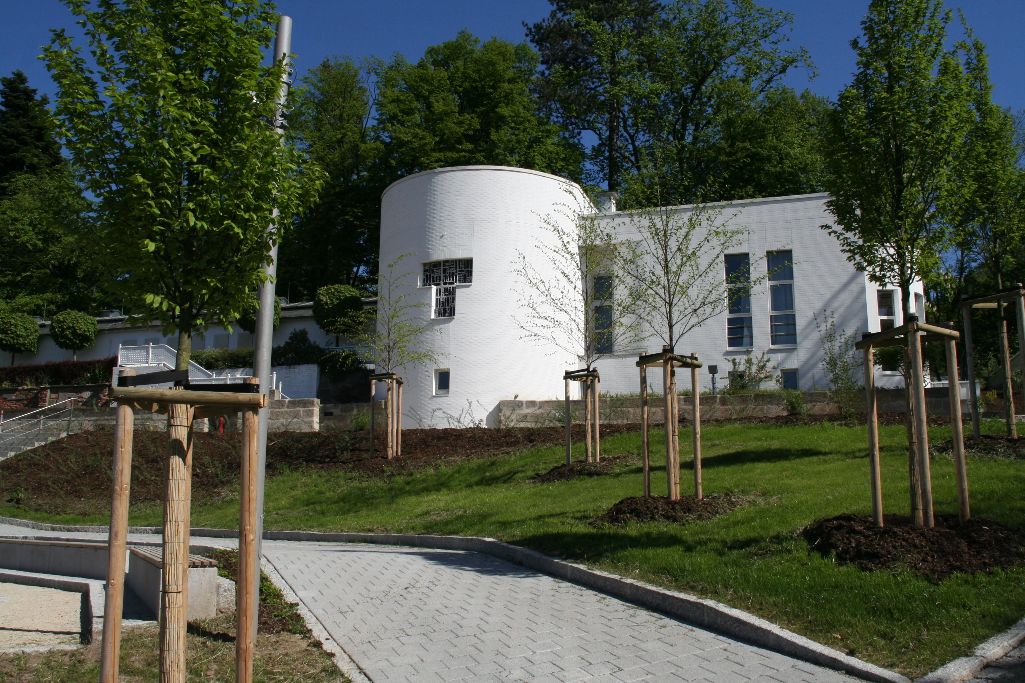 Kunstverein am Hofgarten, Park 4a in Coburg